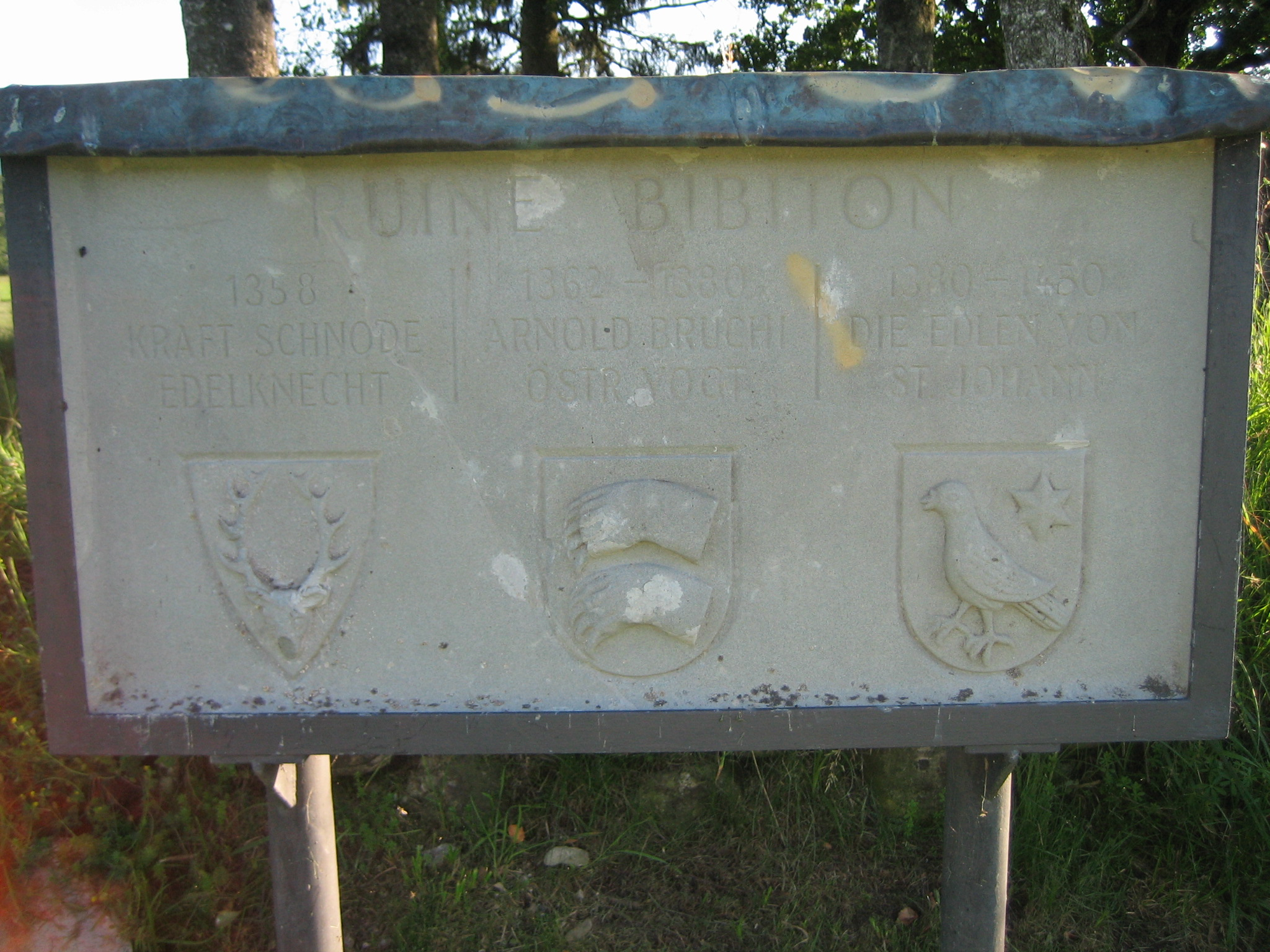 Bibiton: Tafel